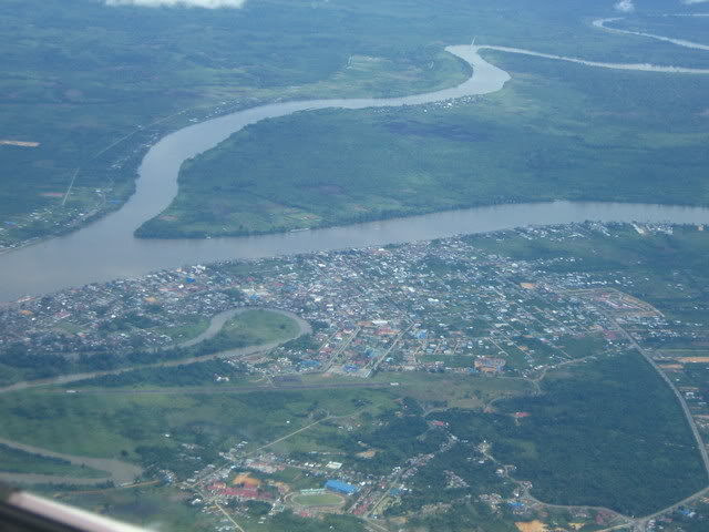 Tanjung Selor, province de Kalimantan du Nord, Indonésie, vue du ciel